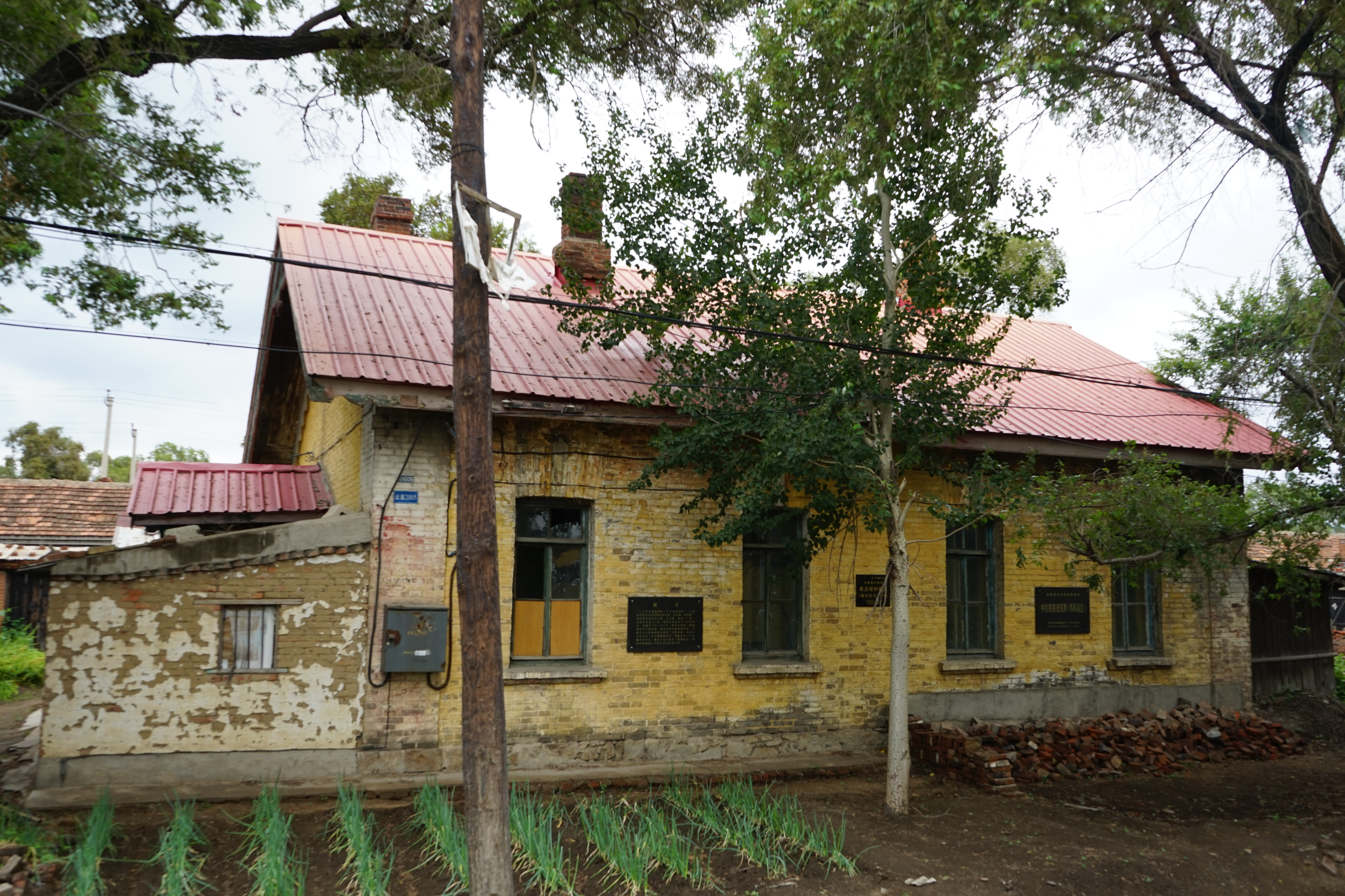 中文（中国大陆）: 中东铁路建筑群——俄式住宅54号